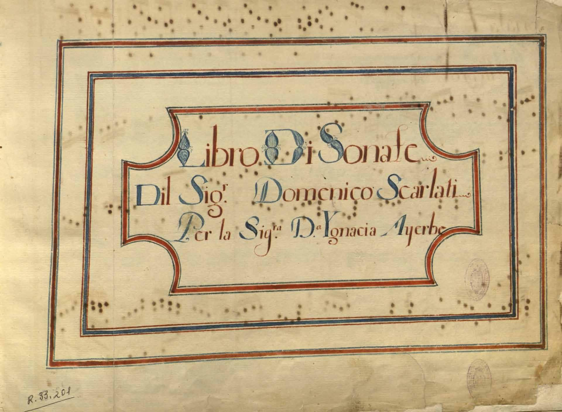 Page de titre du manuscrit Ayerbe de Madrid (E-Mc, ms. 3-1408), intitulé Libro di Sonate del signor Domenico Scarlatti.